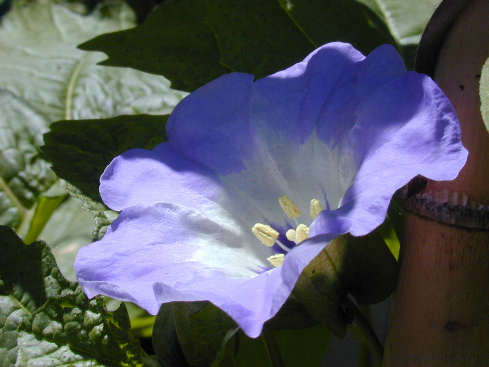 Nicandra physalodes